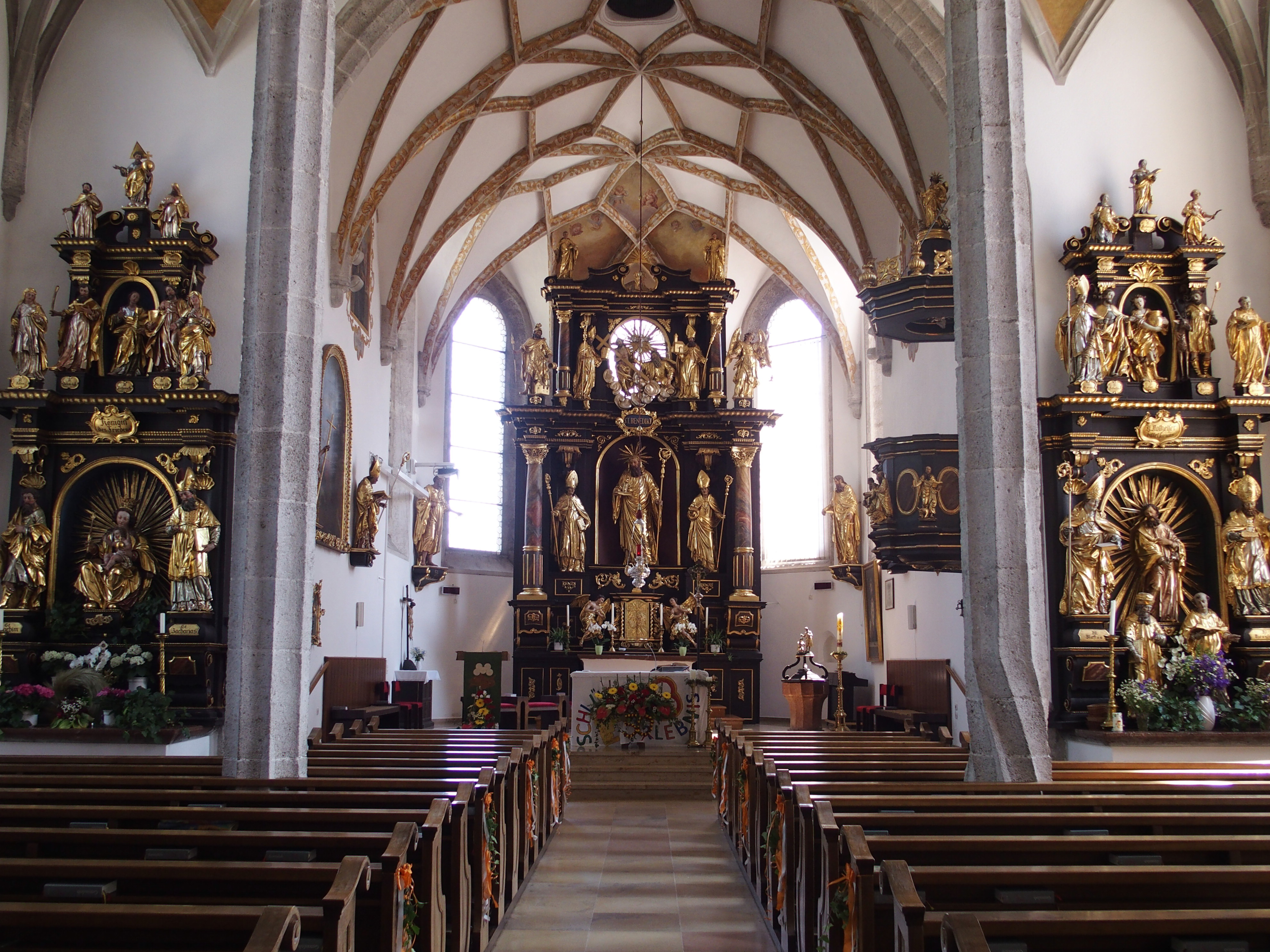 Inneres der Pfarrkirche heiliger Benedikt in Pettenbach: Chor mit barockem Hochaltar und zwei Seitenaltäre